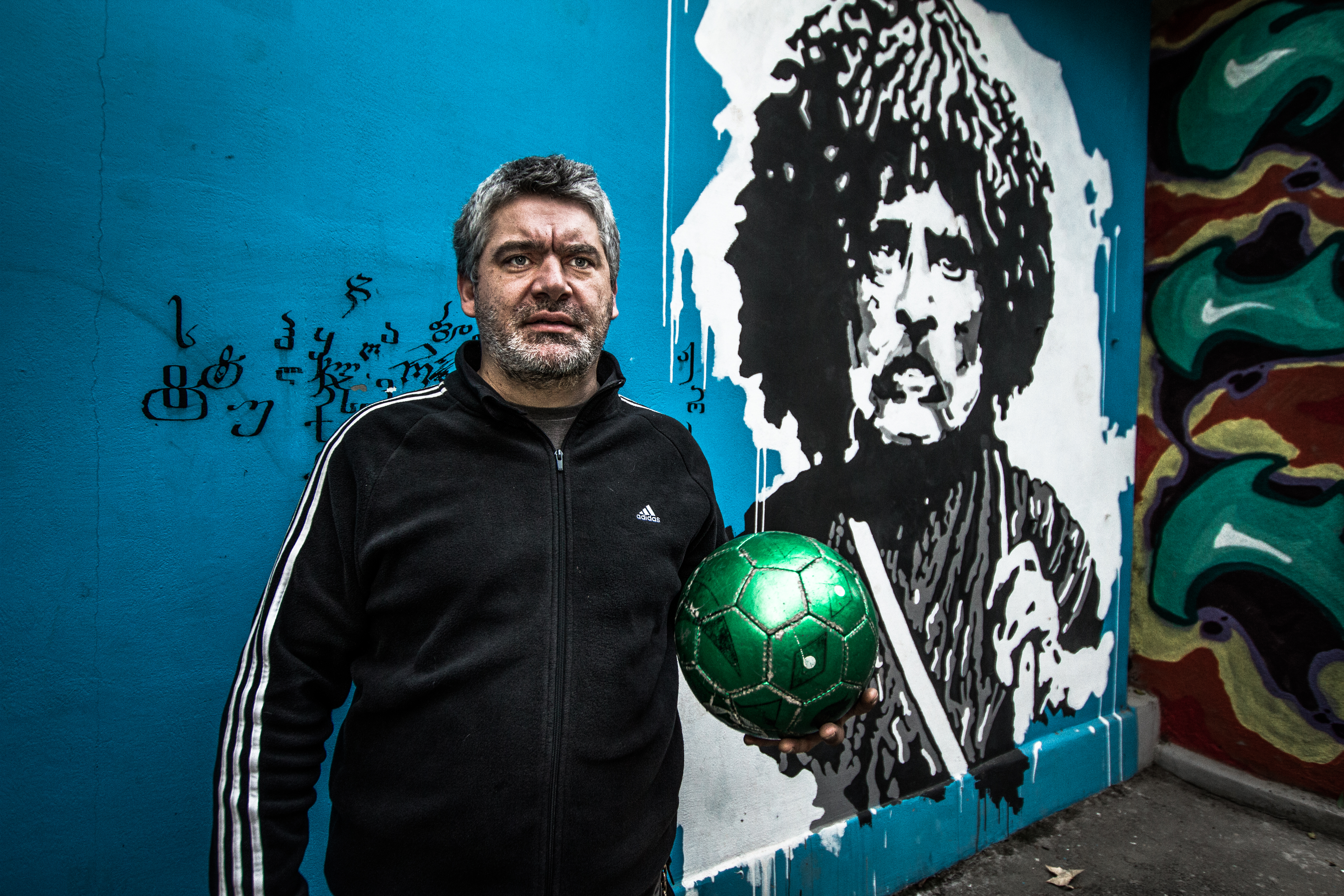 Niaz & Vazhja